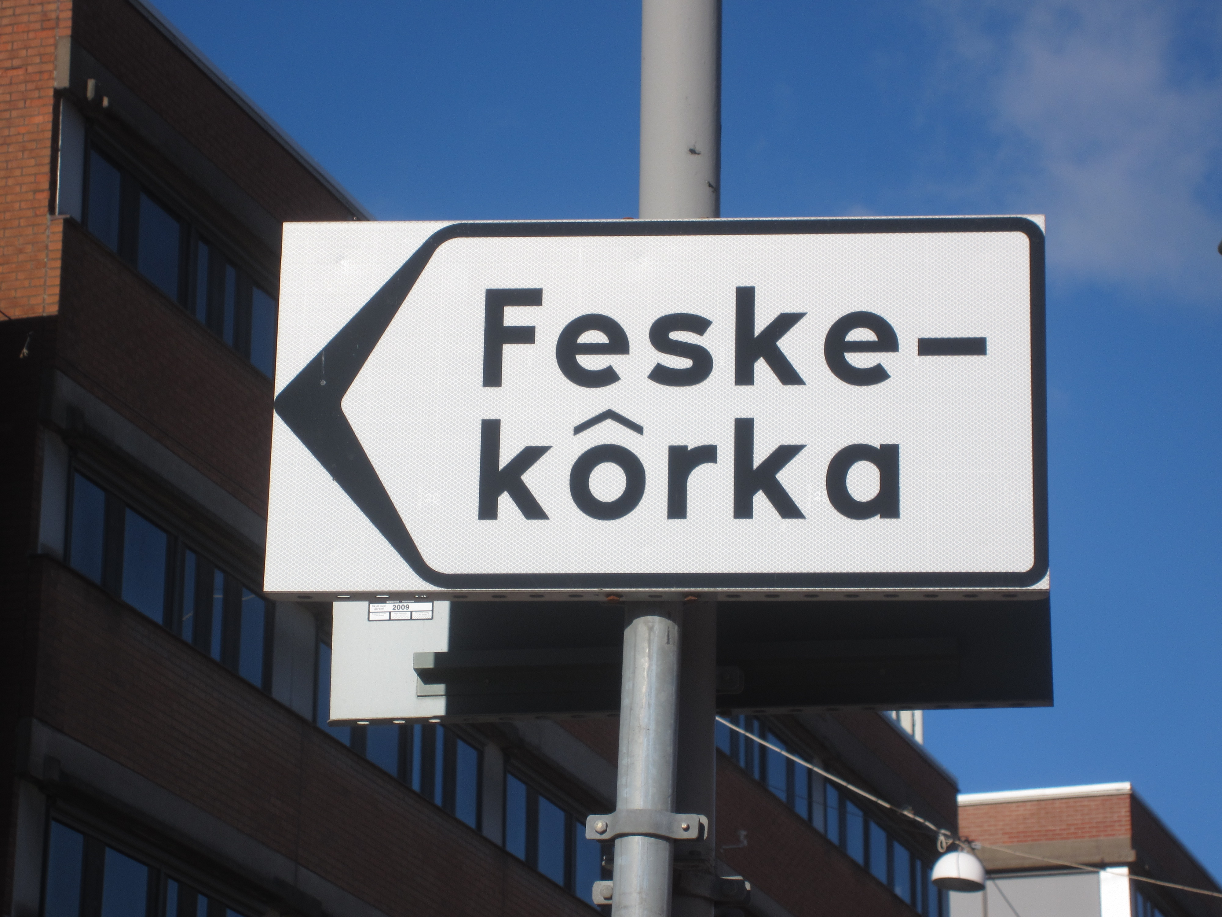 Feskekörka, gatuskylt i centrala Göteborg vid Rosenlundsplatsen.